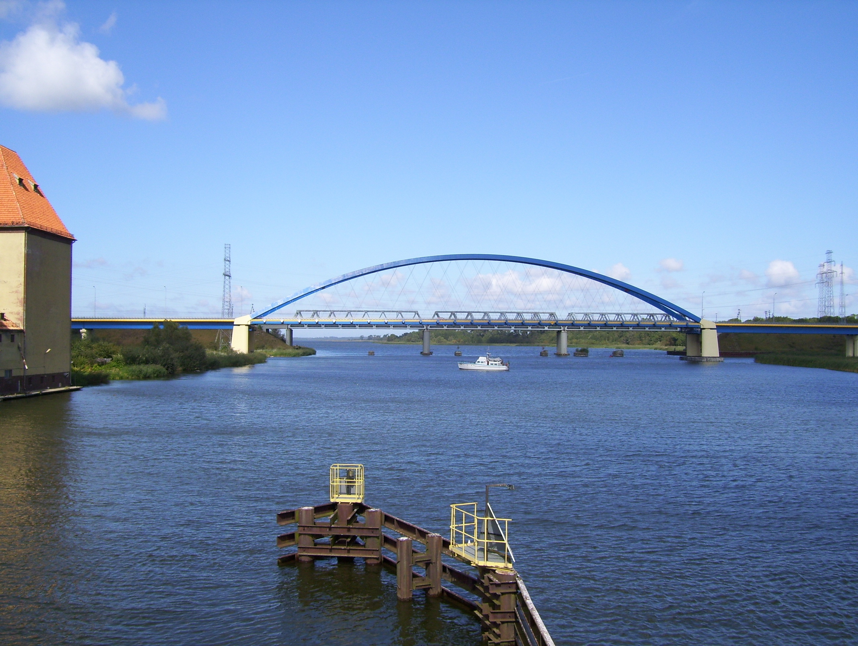 Dievenow / Dziwna - Brücken bei Wolin